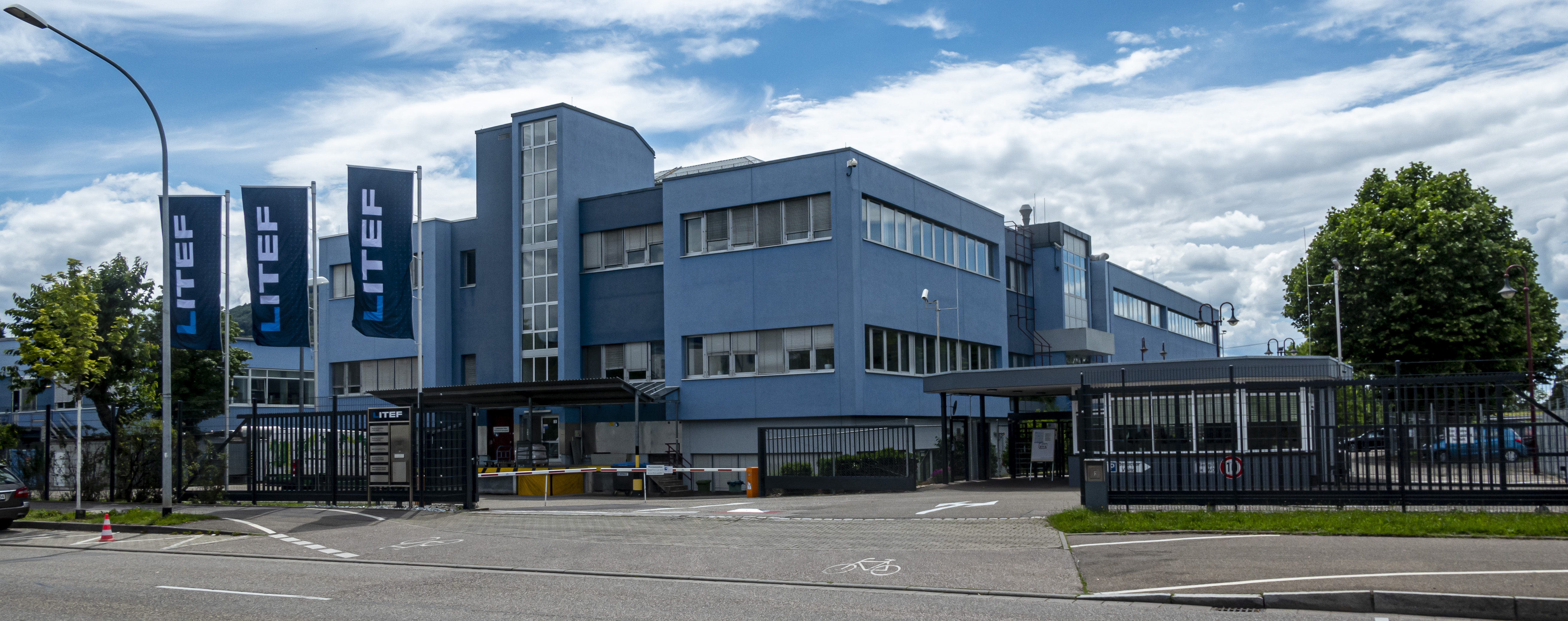 Das Werksgebäude der NG Litef GmbH im Juni 2020